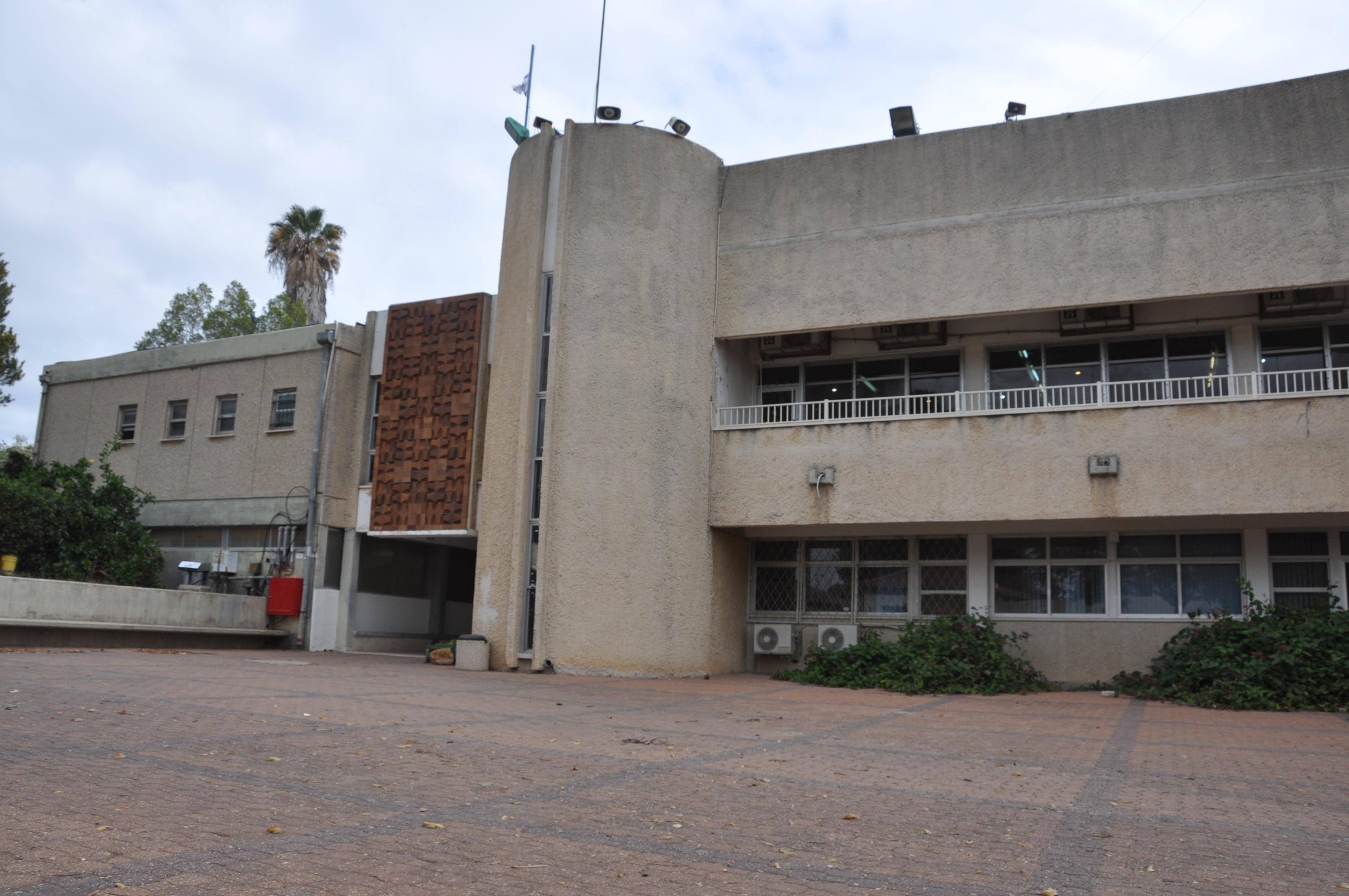 חדר האוכל של המוסד החינוכי צפית